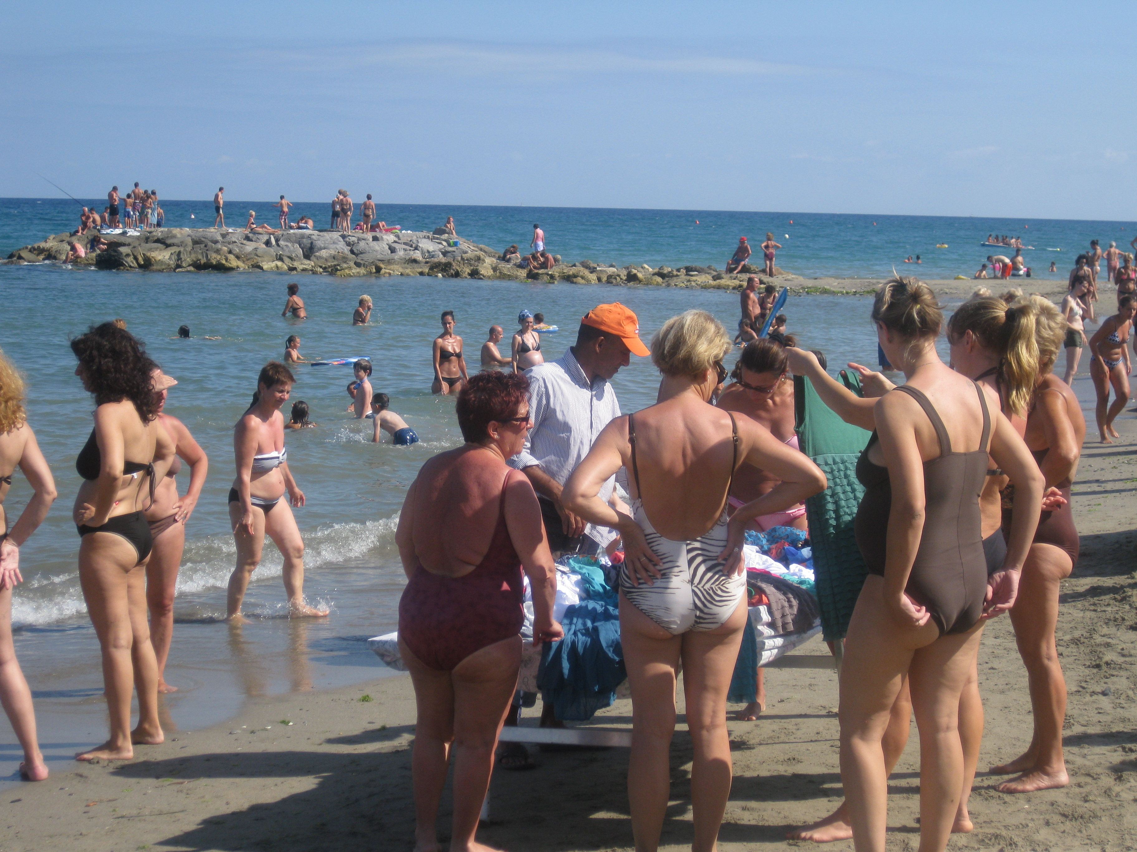 Vù Cumprà in Liguria - ITALY